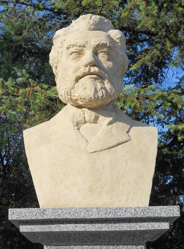 Bustul lui Ion Creangă din Aleea Clasicilor din Bălți